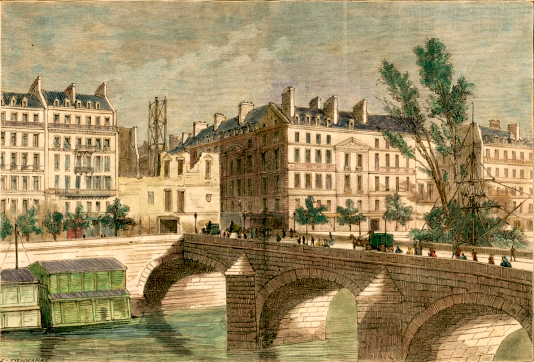 Démolition de l'hôtel de Nesles en vue de l'élargissement de la rue du Bac, à Paris.